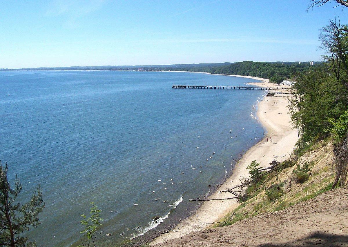 Lazurowe wybrzeże czyli plaża i molo w Orłowie